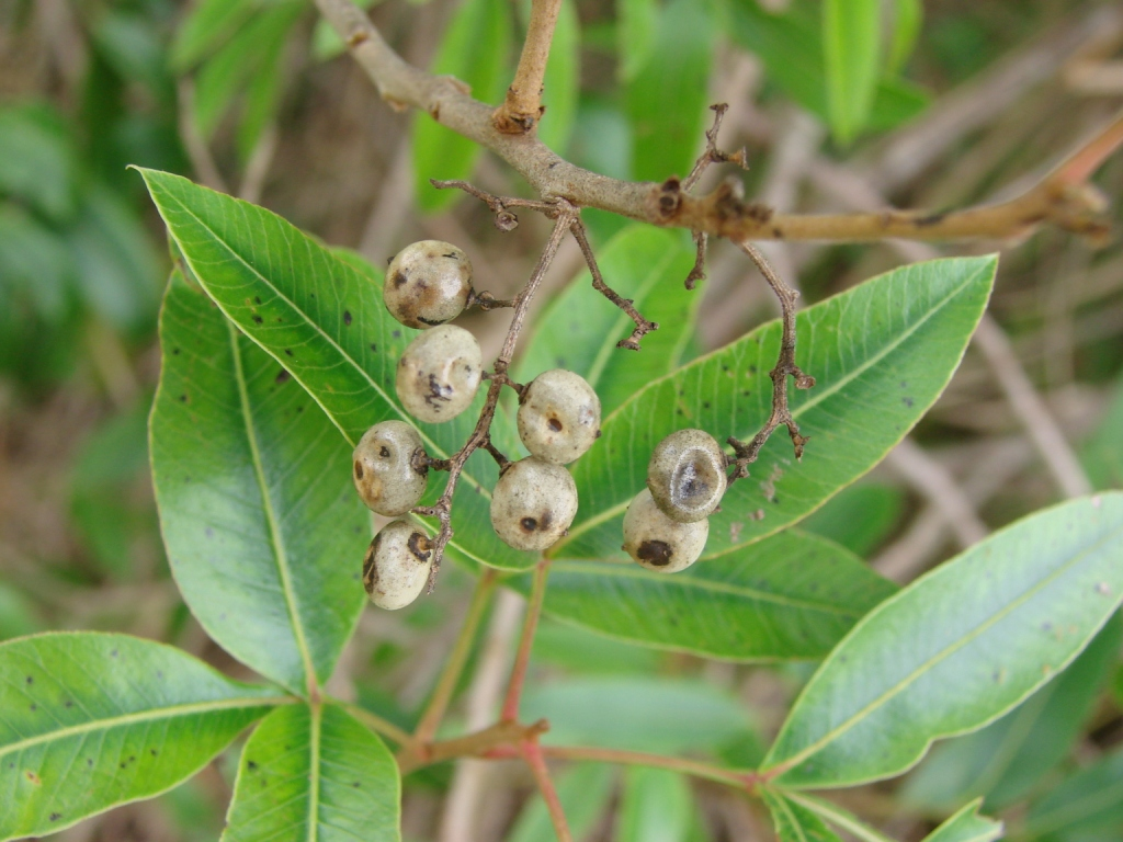 Lithrea molleoides - ANACARDIACEAE - Parque Olhos D'Água - Brasília - Distrito Federal - Brasil.